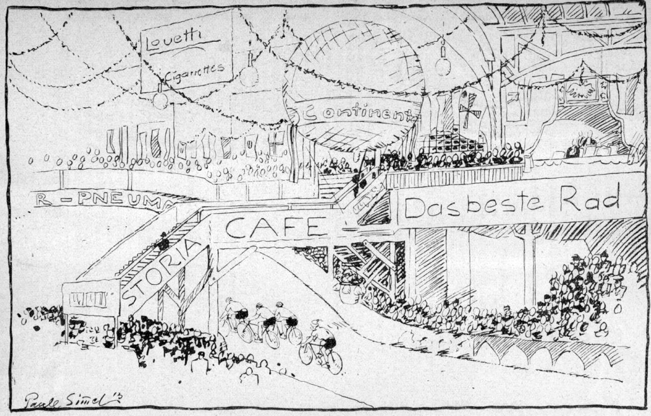 Karikatur des Berliner Sechstagerennens von 1913. Zeichner: Paul Simmel (1887-193)